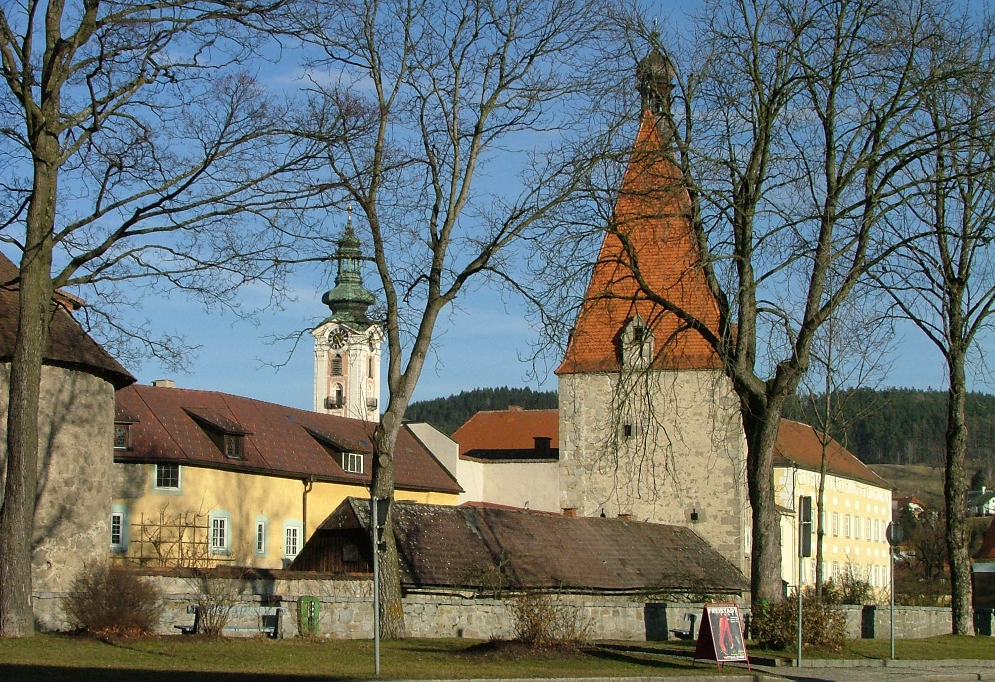 Linzertor und Kirchturm (Freistadt)